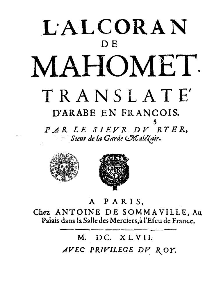 First page of "Le Coran" by André du Ryer.